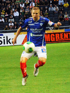 Anton Tinnerholm during the men's Fotbollsallsvenskan soccer game AIK-Malmö FF (2-1) at the Friends Arena in Solna, Sweden on 19 August 2013.